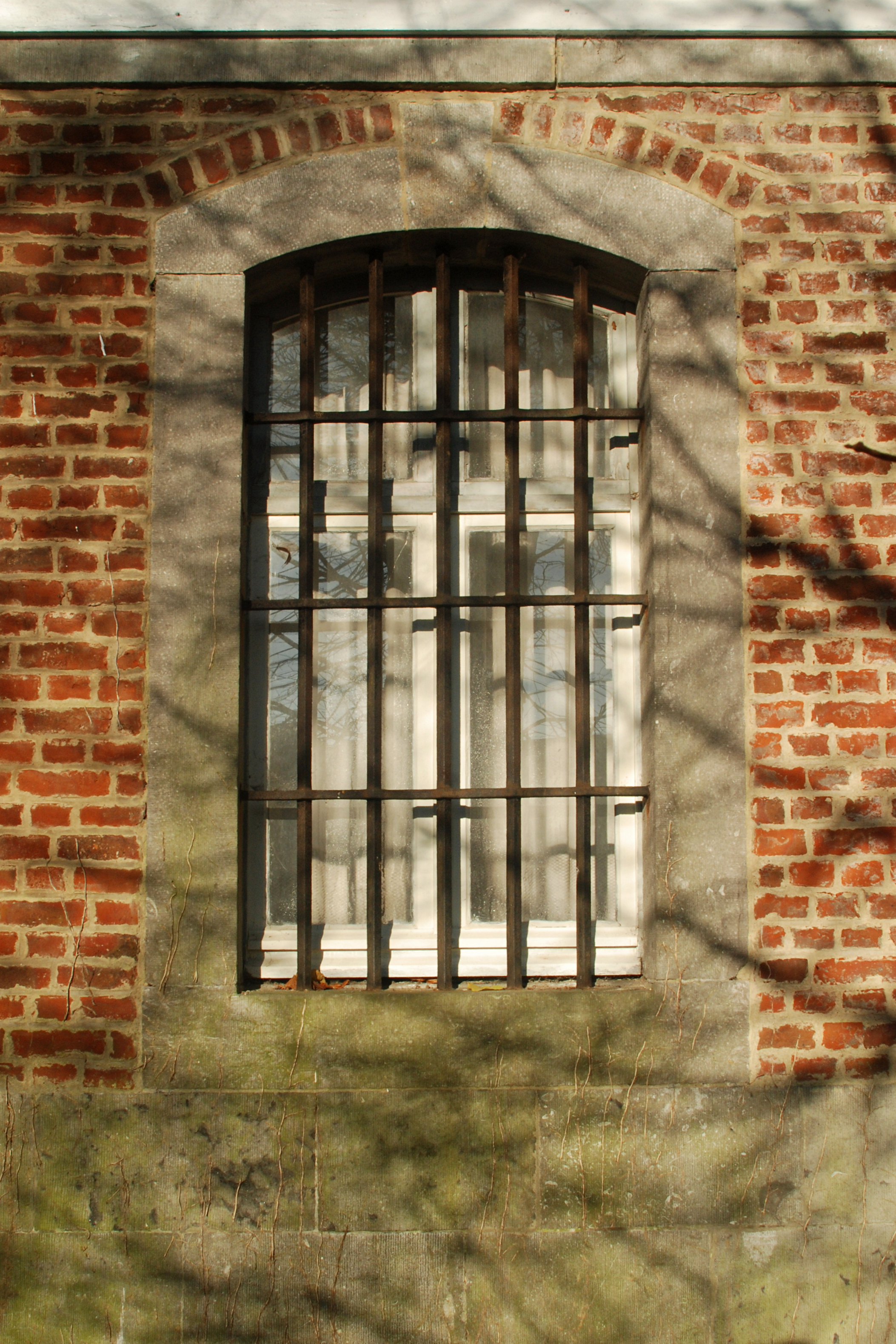 Belgique - Brabant wallon - Court-Saint-Étienne - Église Saint-Étienne